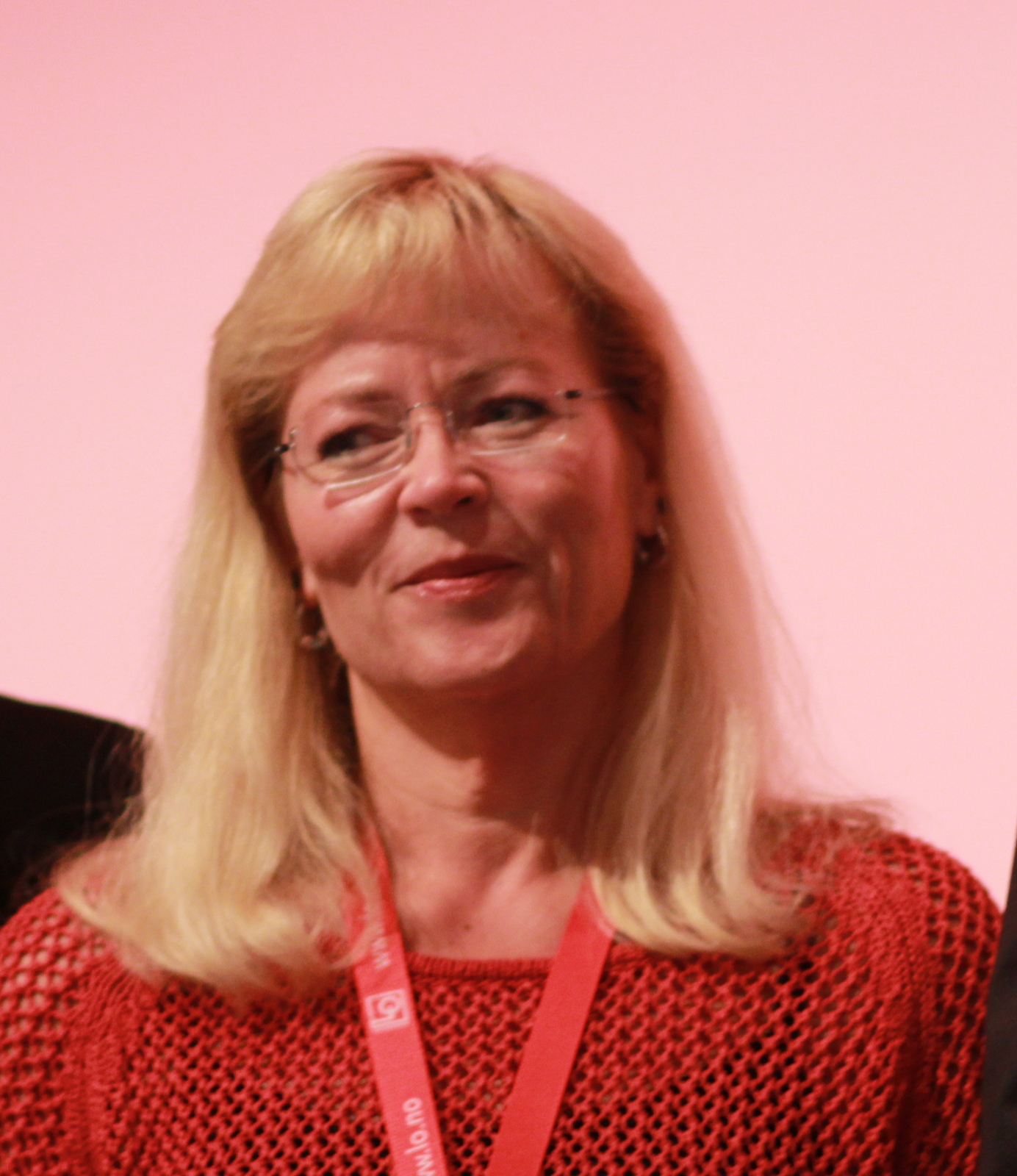 Trude Tinnlund, norsk fagforeningsleder